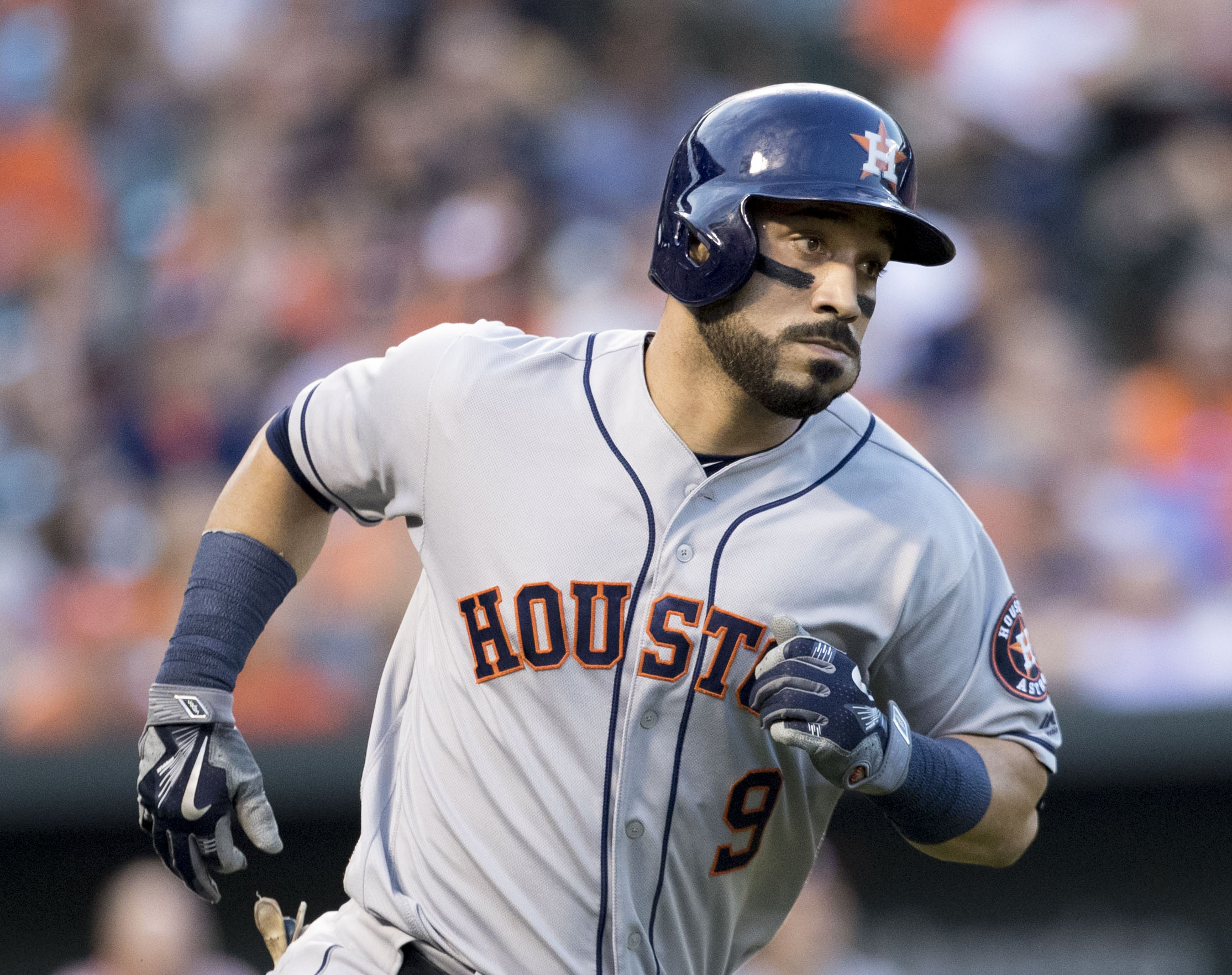 Astros at Orioles 8/18/16